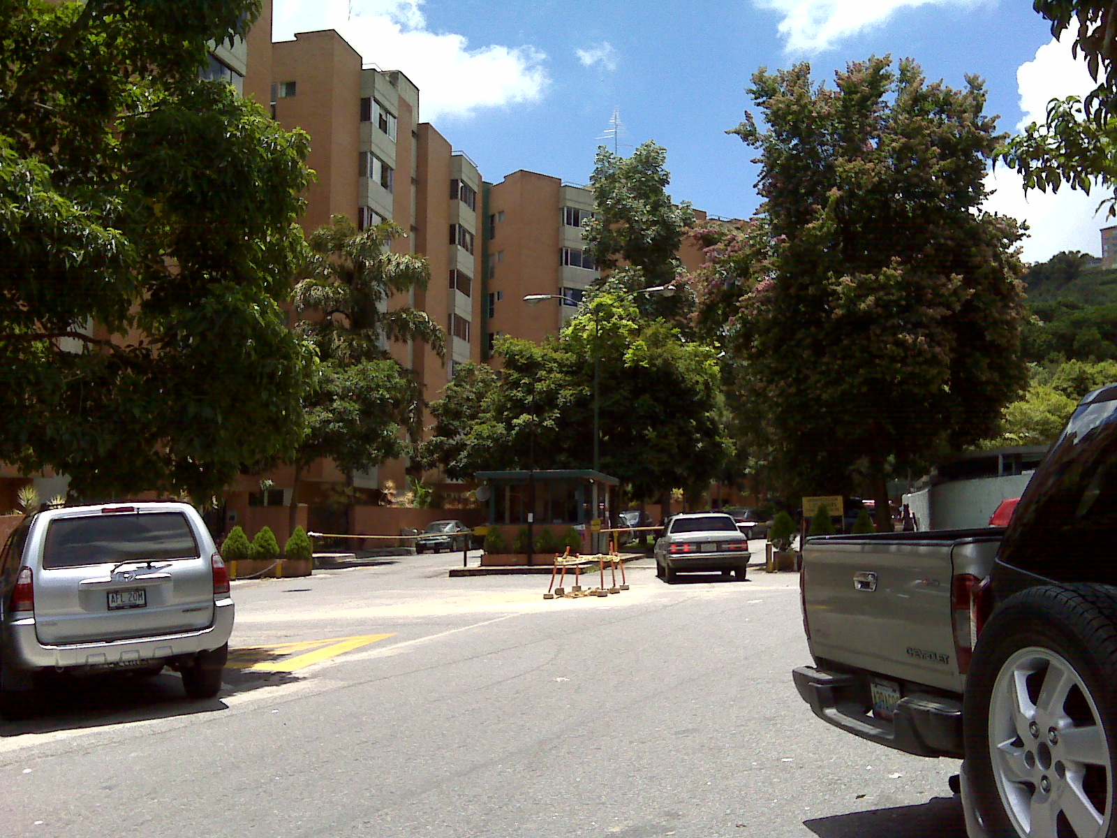 Los Pinos en el sector La Boyera del municipio El Hatillo, estado Miranda - Venezuela (2012)